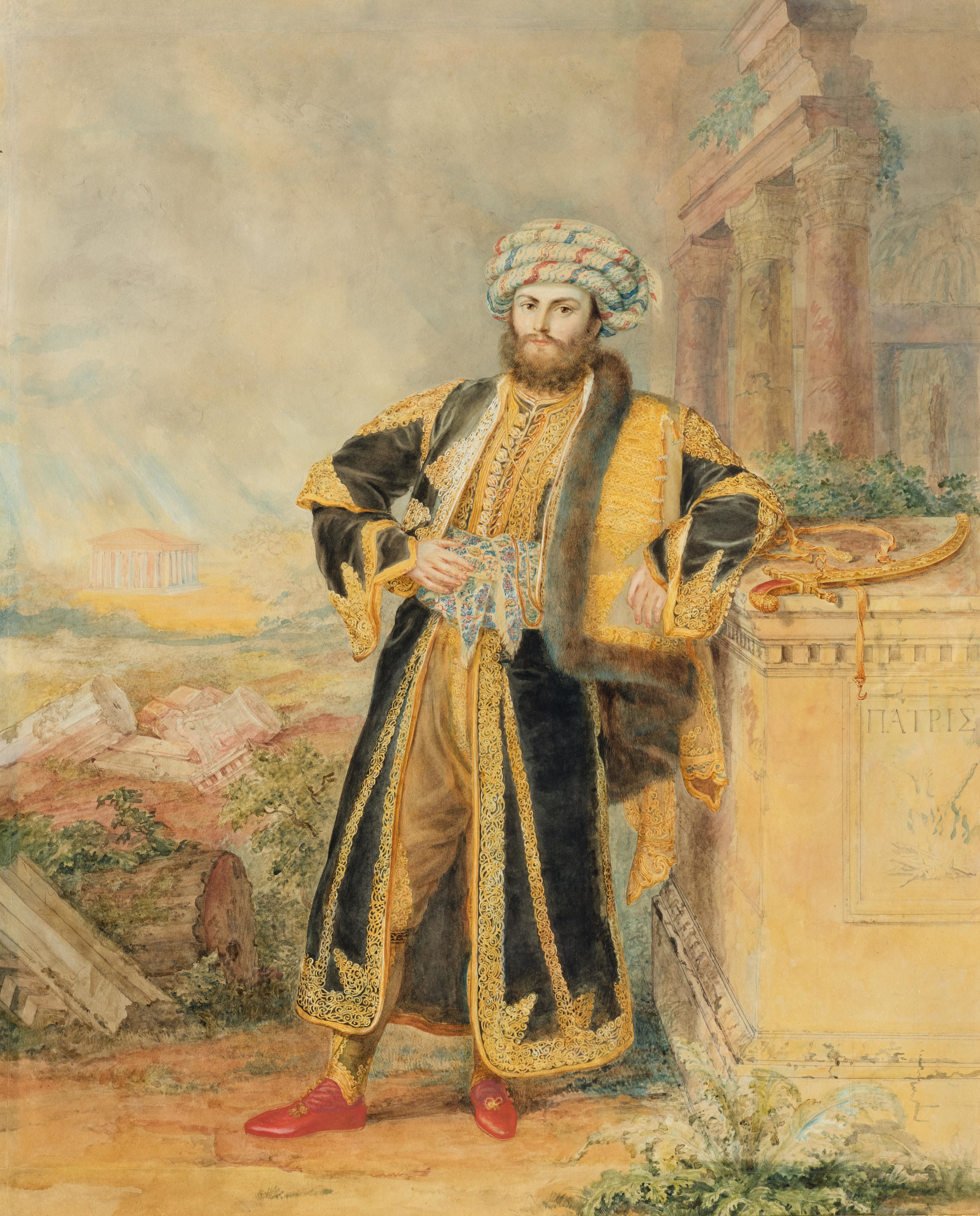 Porträt des Prinzen Alexandros Mavrokordatos als griechischer Freiheitskämpfer in türkischem Kostüm. Aquarell und Kreide auf Papier. 73,5 x 58,4 cm